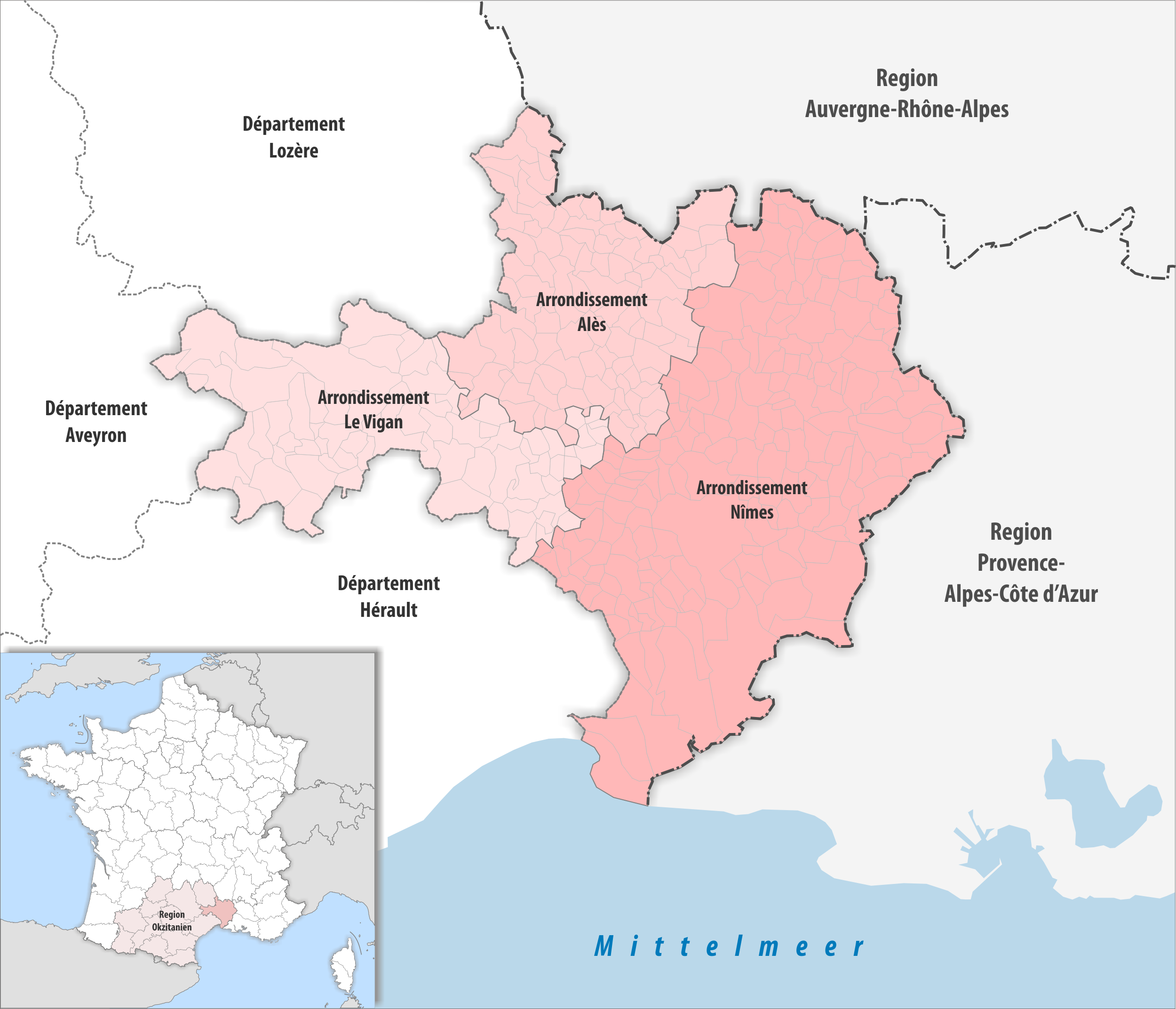 Gemeinden und Arrondissemente im Departement Gard